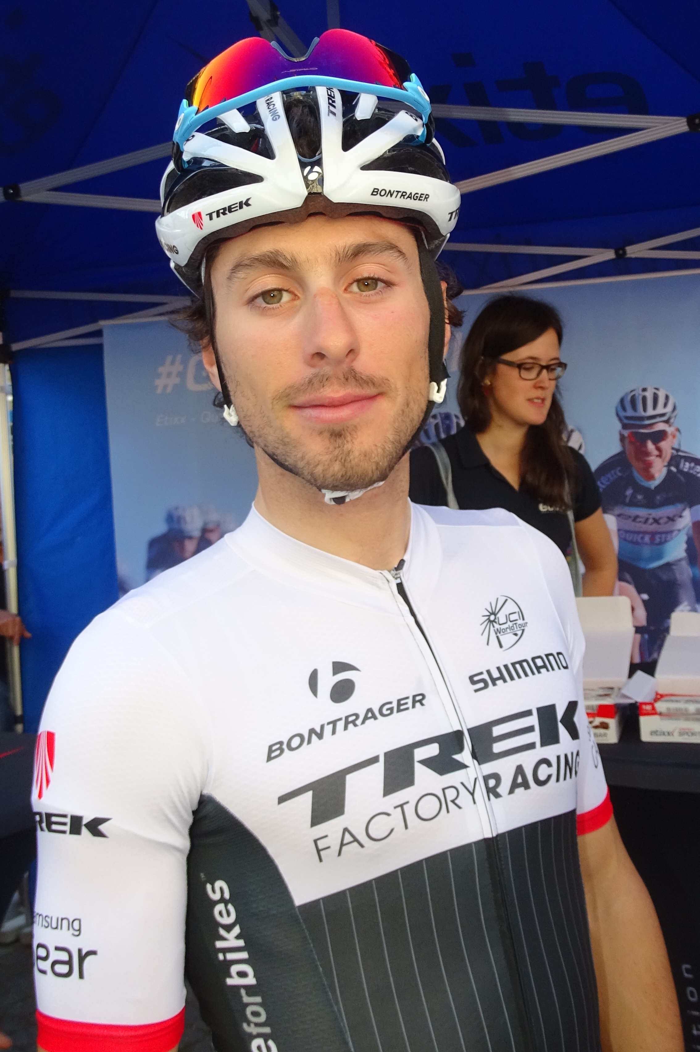 Reportage réalisé le mercredi 15 avril à l'occasion du départ de la Flèche brabançonne 2015 à Louvain, Belgique.